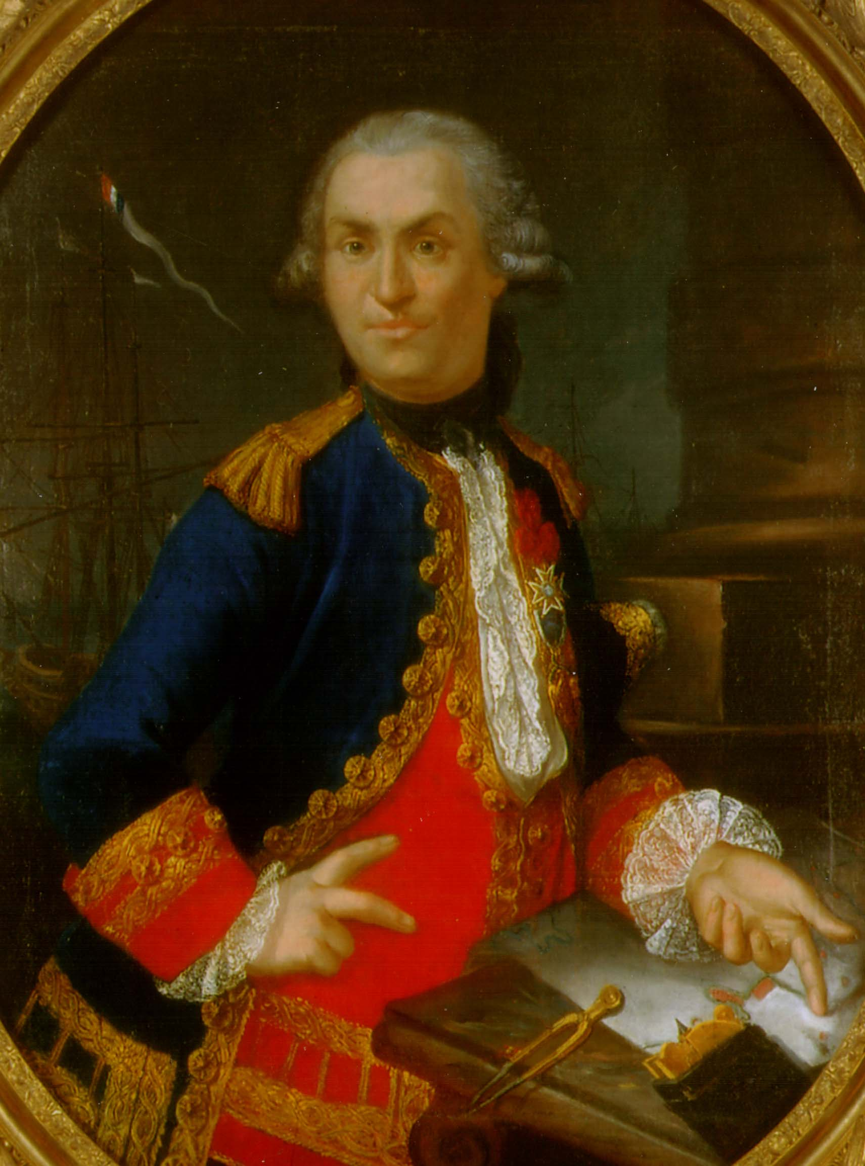 Georges-René Pléville Le Pelley (1726-1805), peint à Versailles, 1787, beau-frère d'Agathe de Rambaud palais des Tuileries Famille Mottet